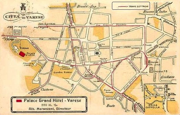 Varese, planimetria tram centro nel 1917